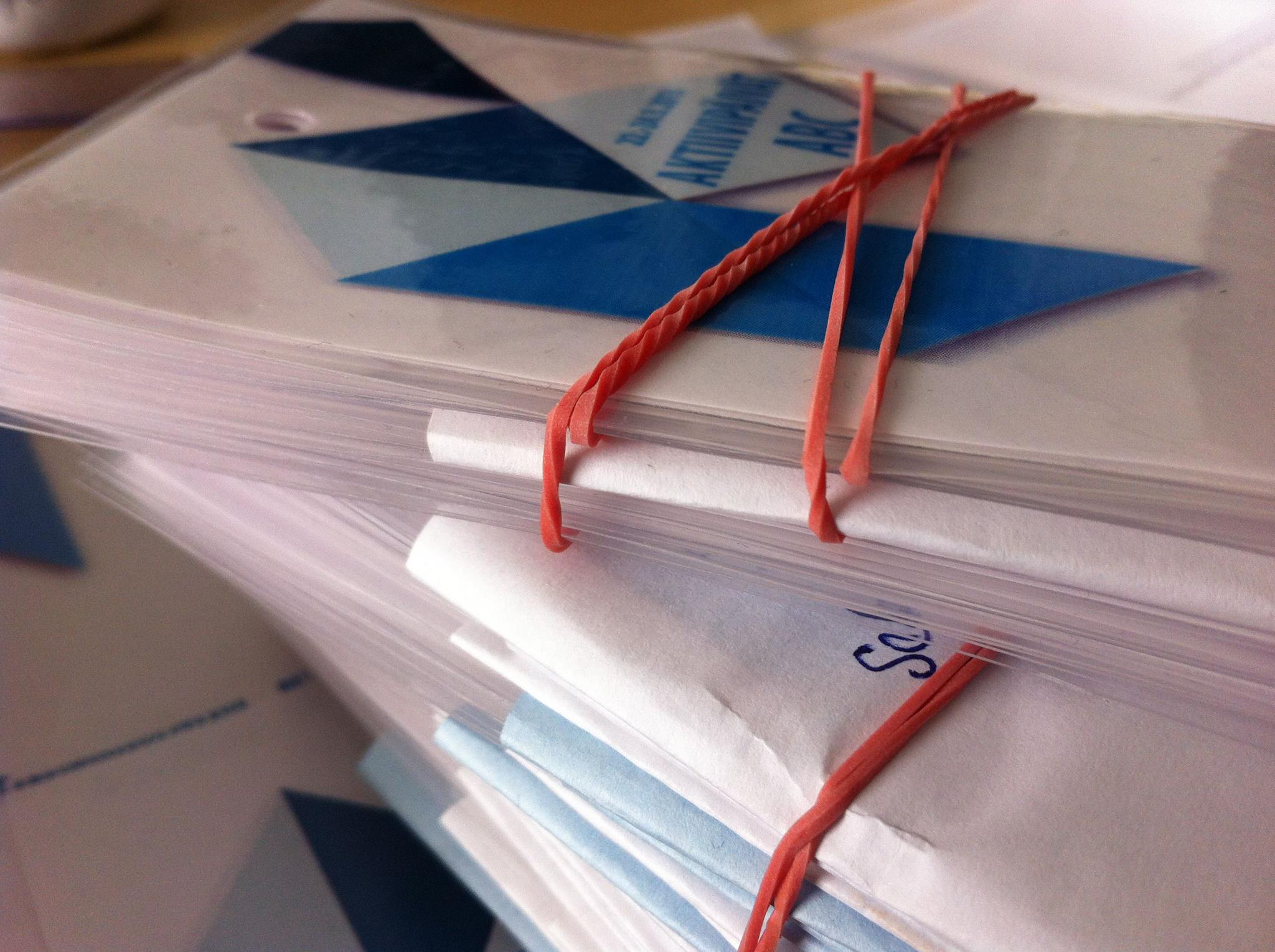 Koulutusmateriaaleja